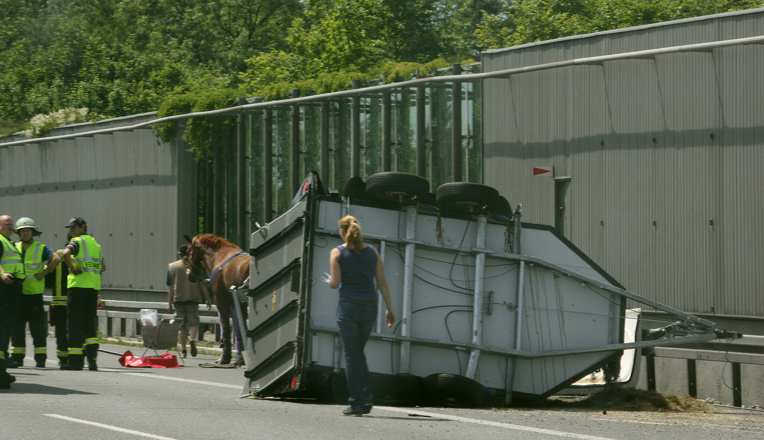 Unfall auf der A 99. Umgekippter Pferdeanhänger. Pferd auf der Fahrbahn. Unfallaufnahme.